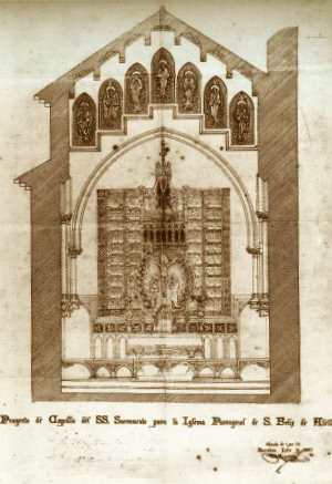 Dibujo de Gaudí del proyecto de Retablo de la Crucifixión para la Capilla del Santísimo de la Iglesia Parroquial de San Félix (Sant Feliu) de Alella, próxima a Barcelona. Es un dibujo a tinta conservado actualmente en el Archivo Parroquial de Alella,publicado por primera vez en ARTÈS, SALVADOR y GALERA, LLUÍS (1959) Notes històriques de la parròquia de Sant Fellu d'AleIla. Alella. Publicacions de la Parròquia d'Alella.